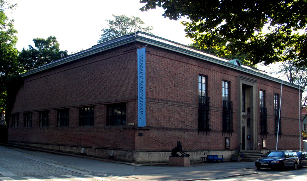 Trondheim Kunstmuseum (Trondheim Art Museum), Bispegata 7b. Built 1930. Architect: Peter Daniel Hofflund.